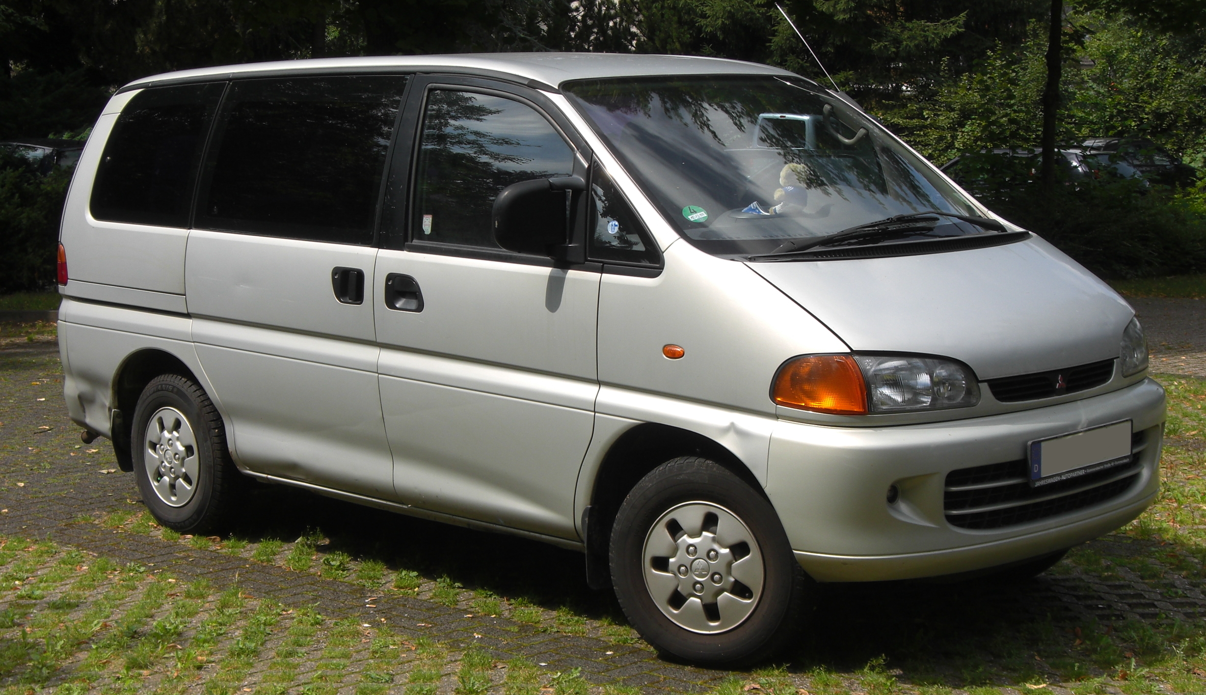 Mitsubishi Delica L400 Space Gear 2WD (GLX model)